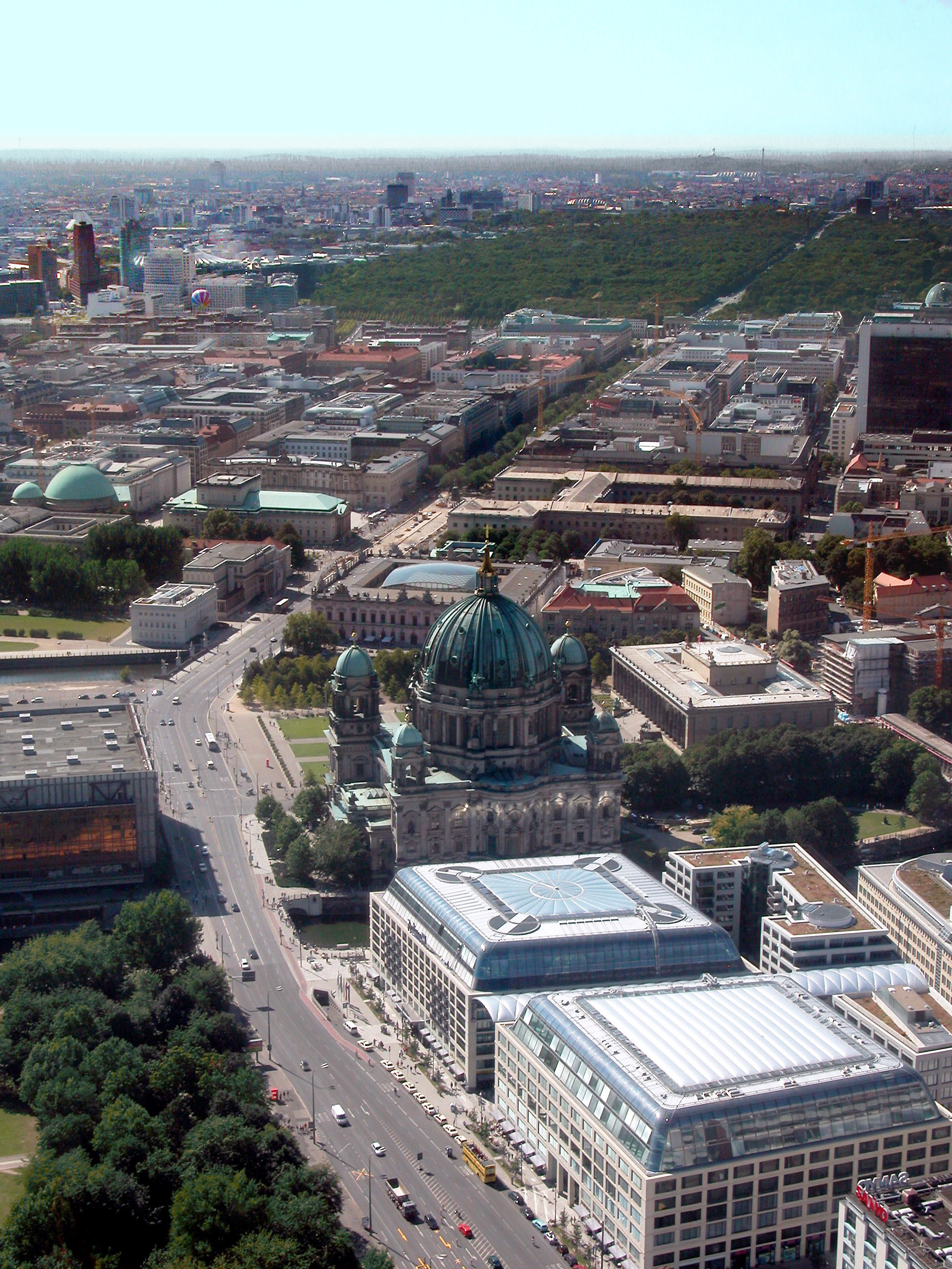 Berlin, Unter den Linden; im Vordergrund Karl-Liebknecht-Straße, Schlossplatz (mit Dom) und Lustgarten (mit Altem Museum)